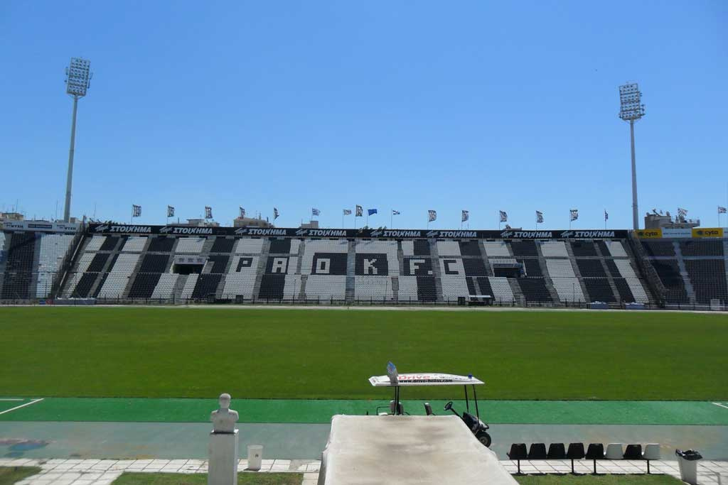 Paok stadium